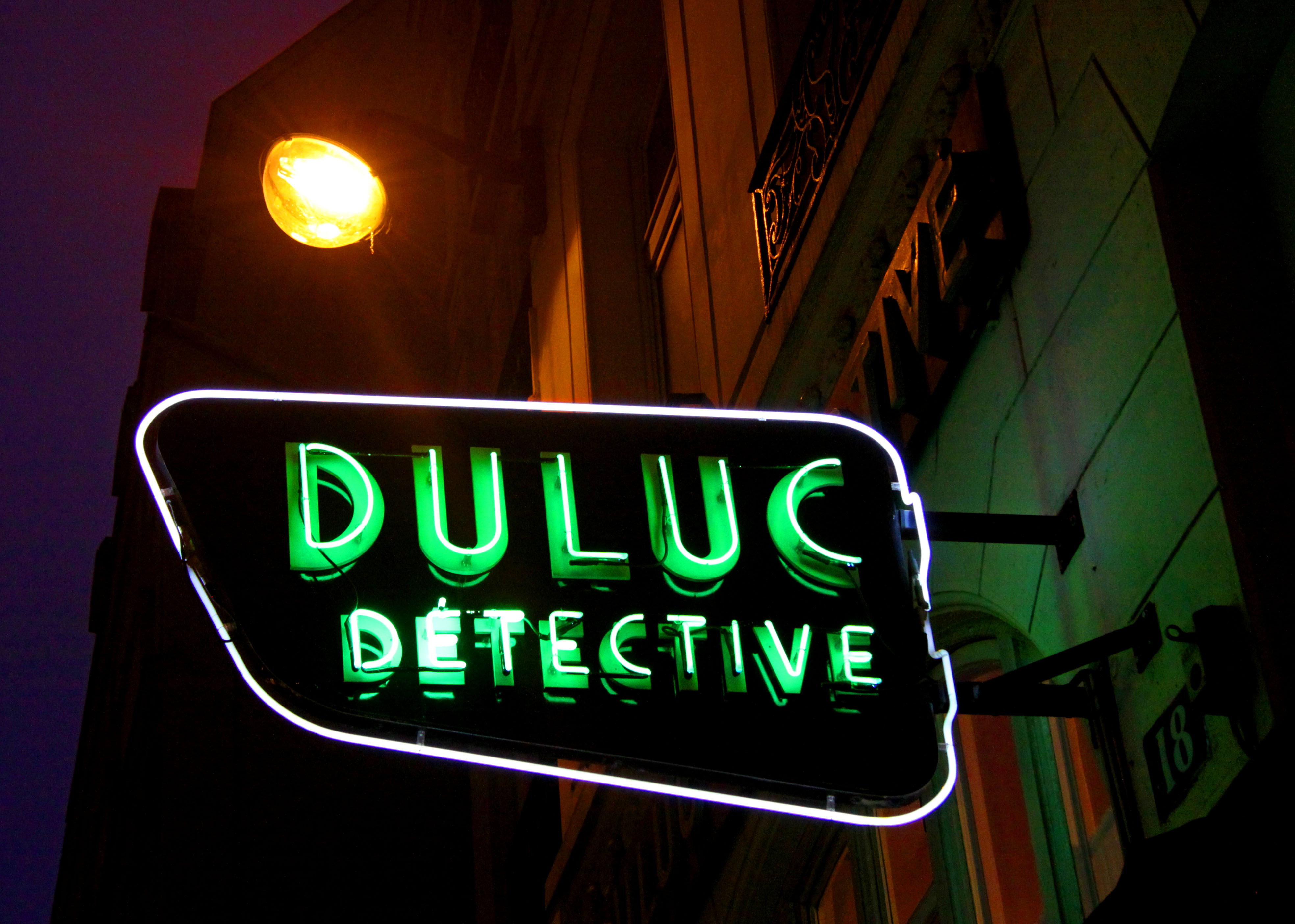 Agence Duluc, 18 rue du Louvre, 75001 Paris.